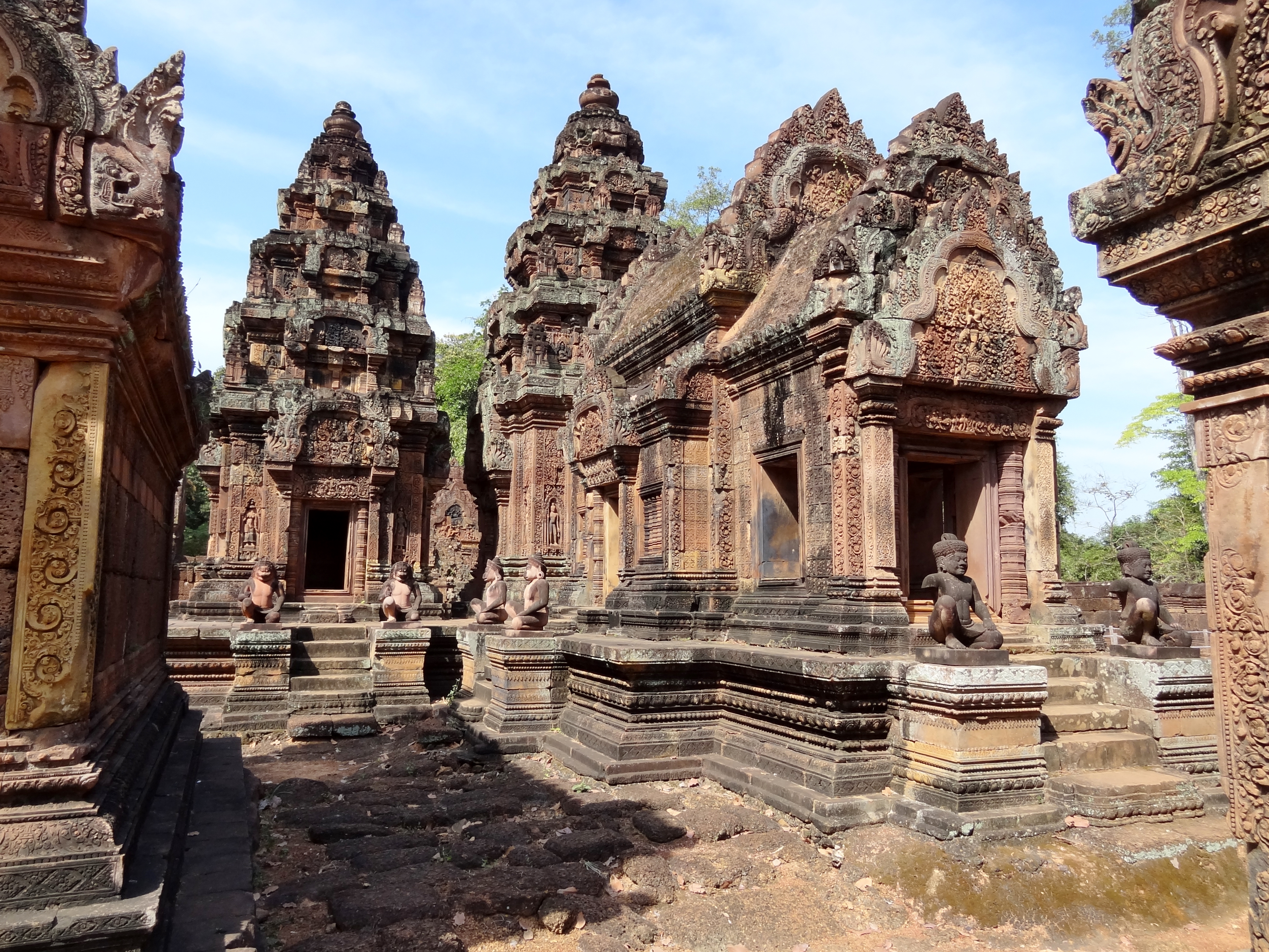 Zentraler und südlicher Prasat der Banteay Srei (ប្រាសាទបន្ទាយស្រី ‚Zitadelle der Frauen‘), ursprünglich Tribhuvanamahesvara (‚Großer Gott der dreifaltigen Welt‘), Provinz Siem Reap, Kambodscha